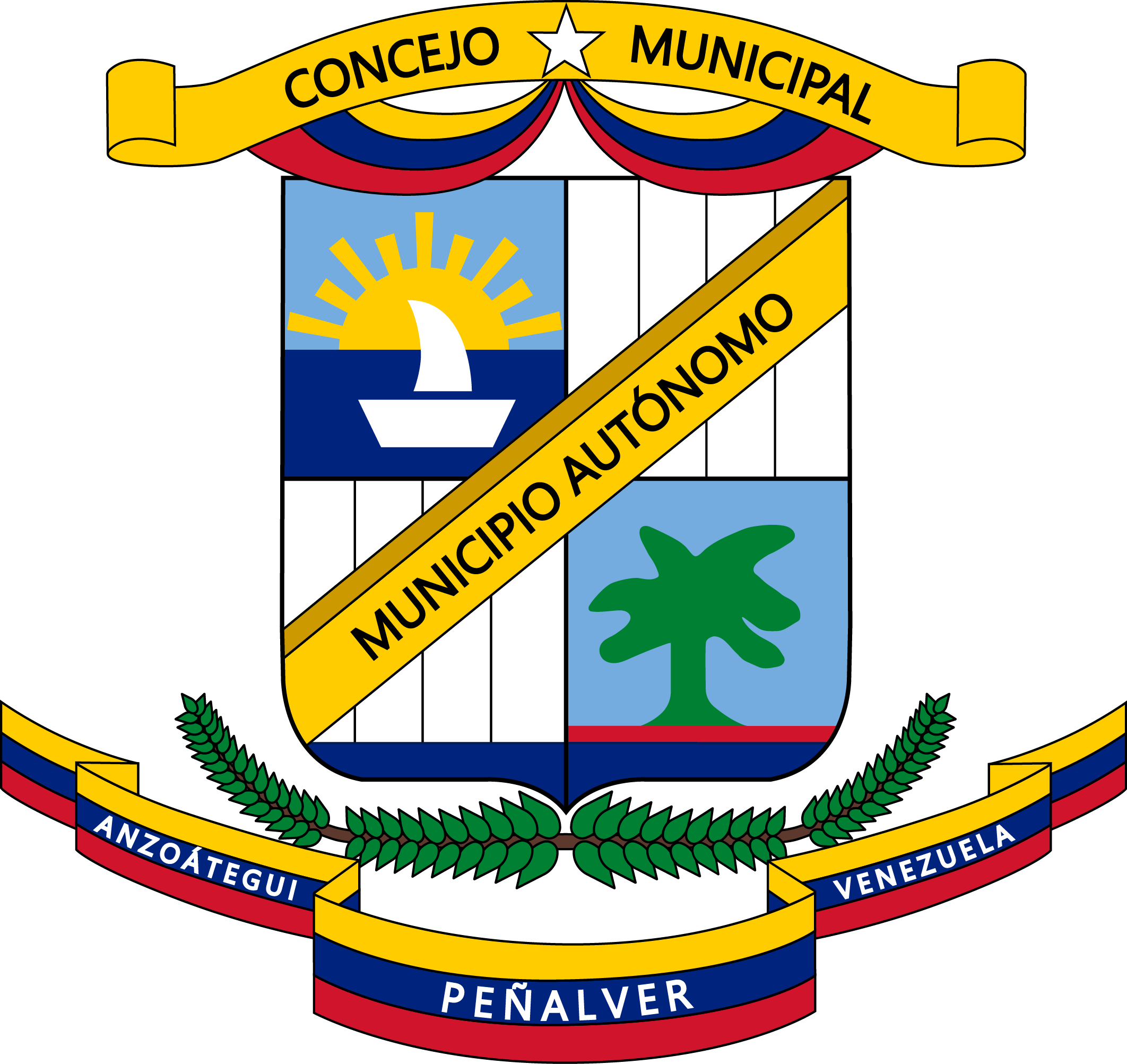 Escudo de Armas del Municipio Fernando de Peñalver (Anzoátegui)